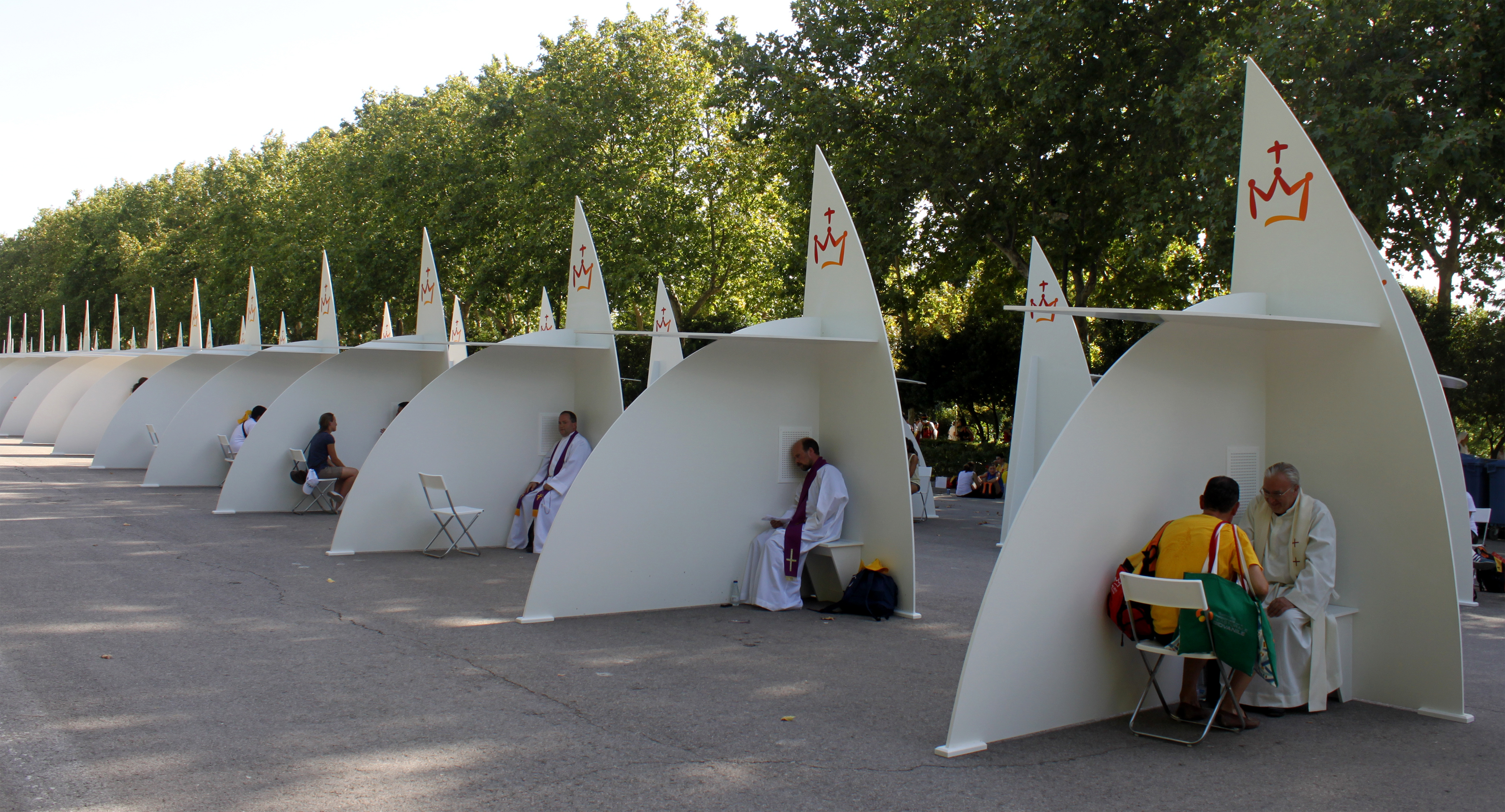 Personas confesándose en los confesionarios instalados en El Retiro por la Jornada Mundial de la Juventud de Madrid 2011